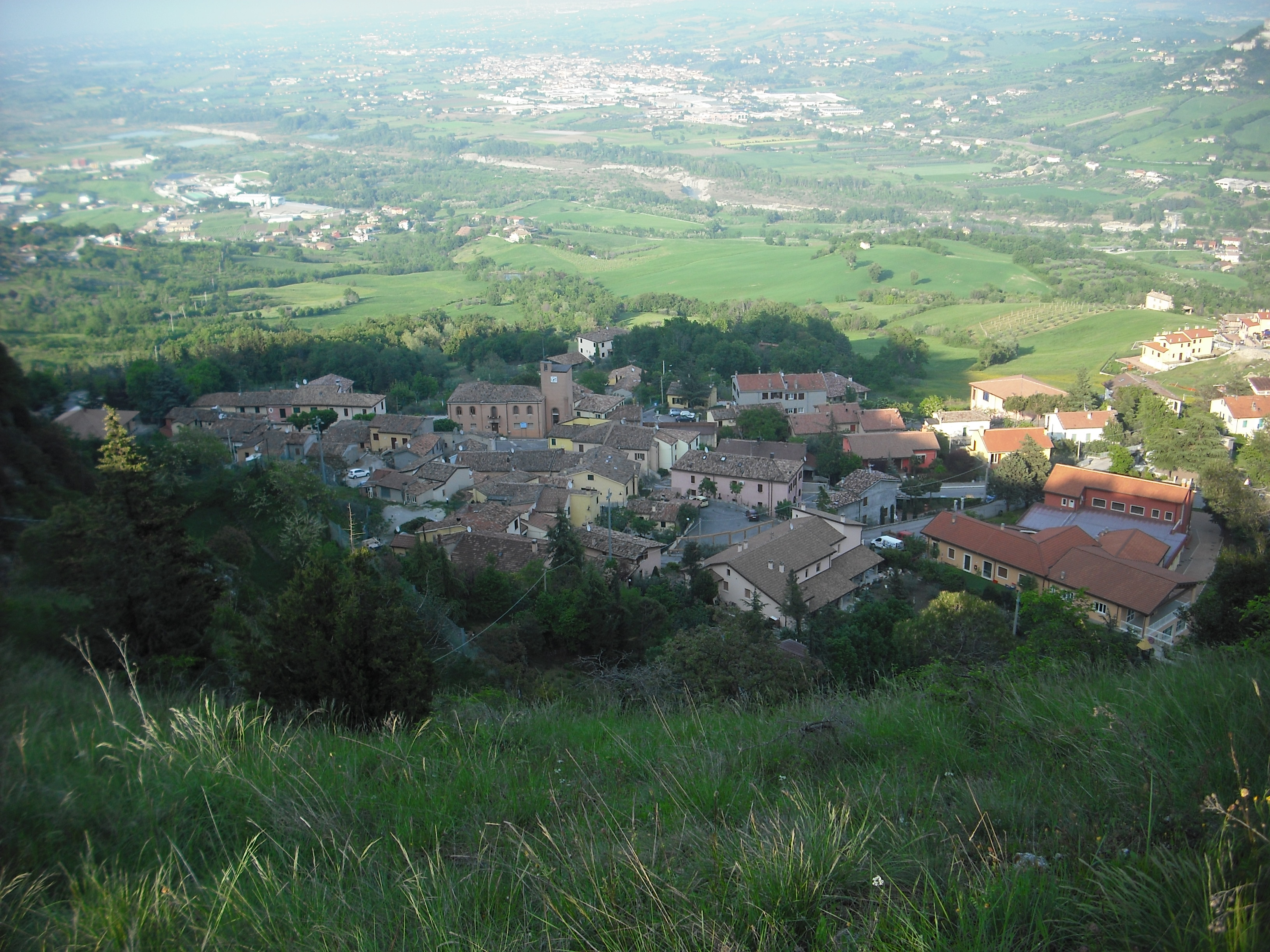 Vista di Torriana dallo sperone di roccia situato sopra al paese.